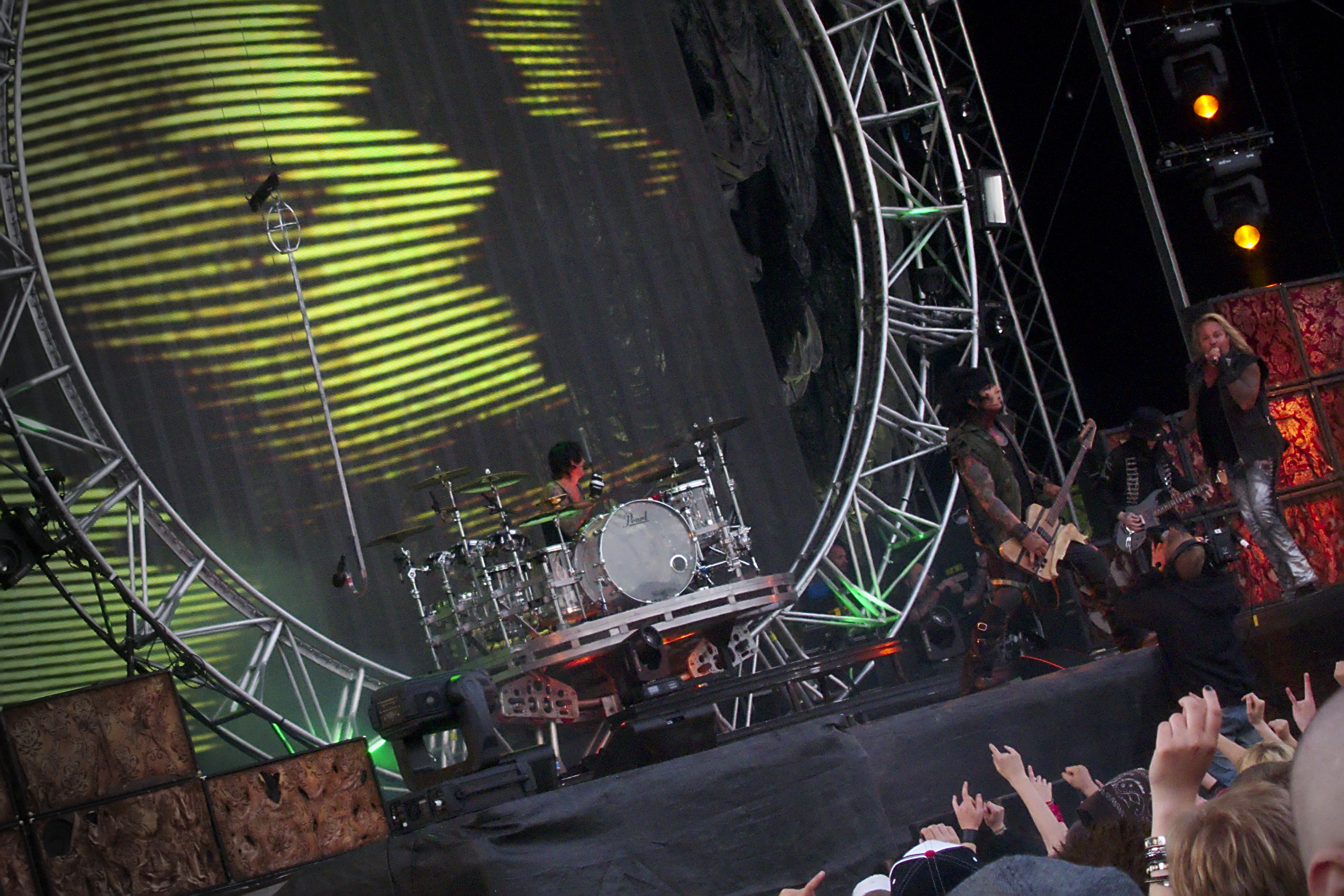 Mötley Crüe live. Rocking Hellsinki Vol. 1. Kaisaniemenpuisto, Helsinki (Finland). 2012.06.07